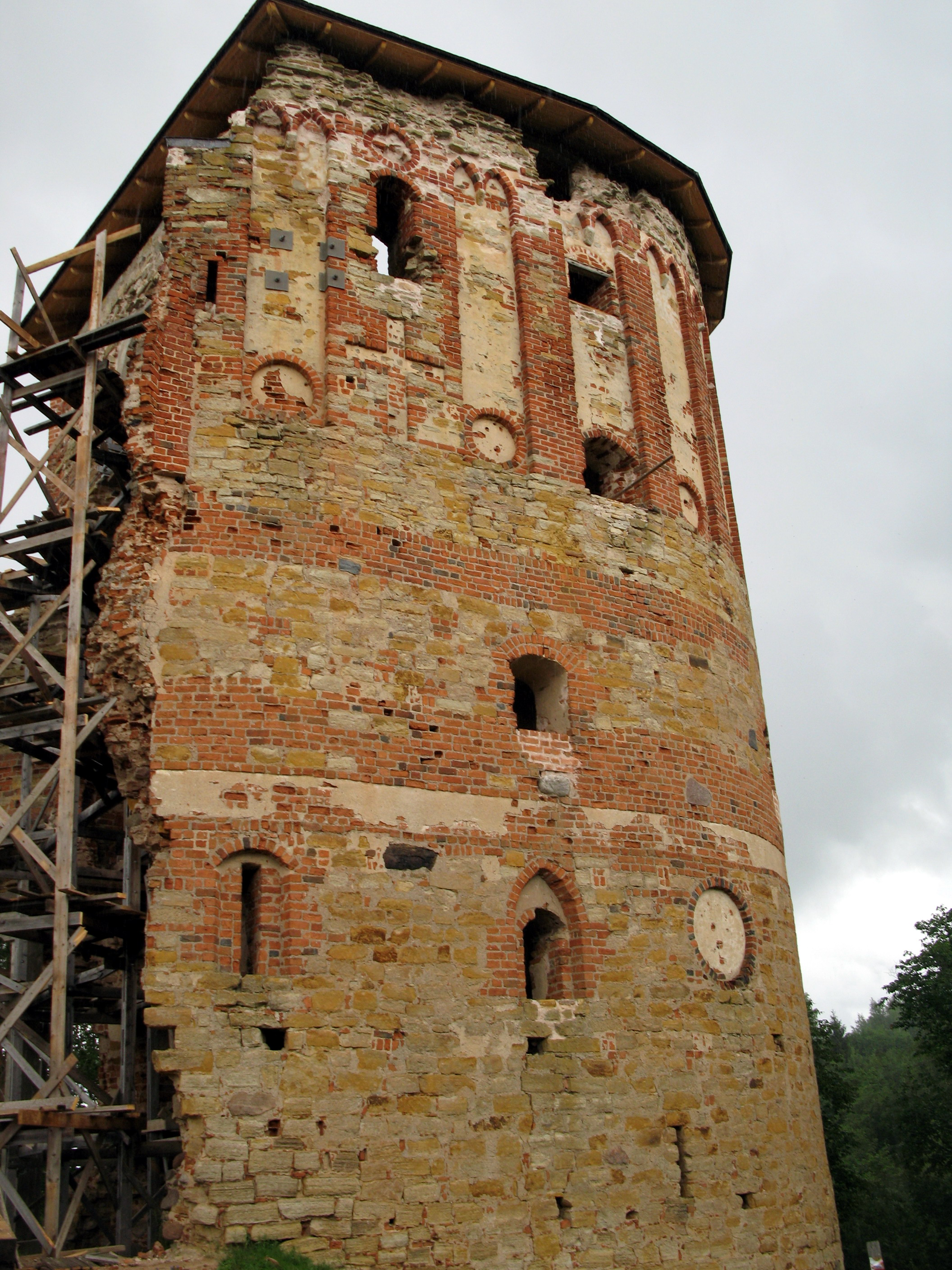 Vastseliina